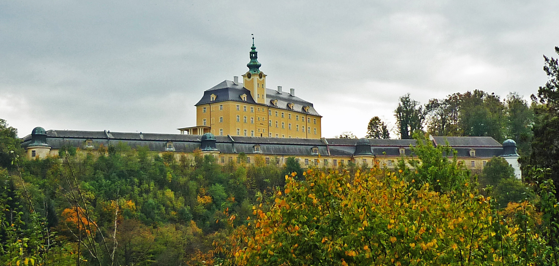 Oberes und Unteres Schloss über der Stadt Fulnek